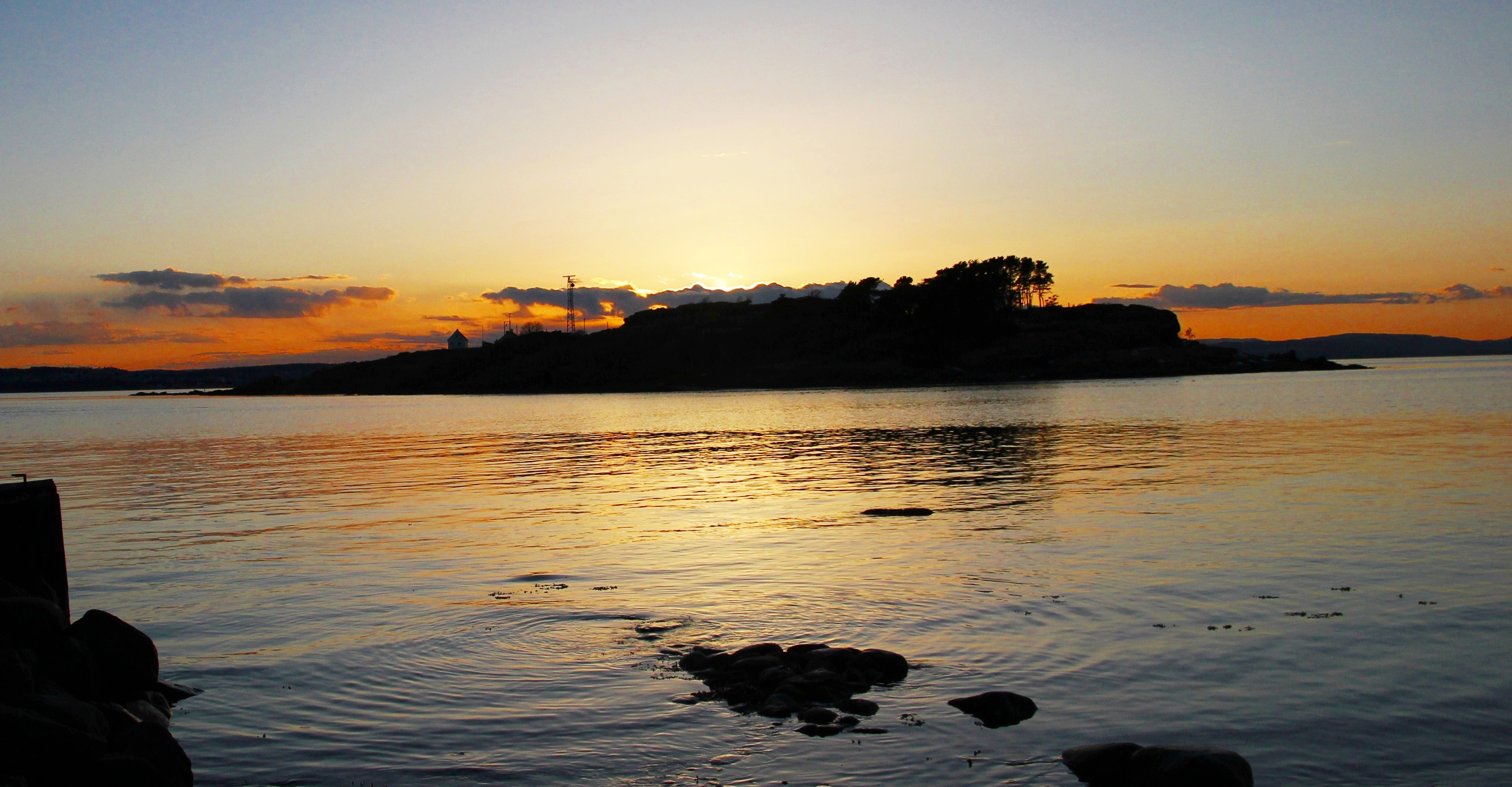 The island Gullhomen outside Moss, Norway